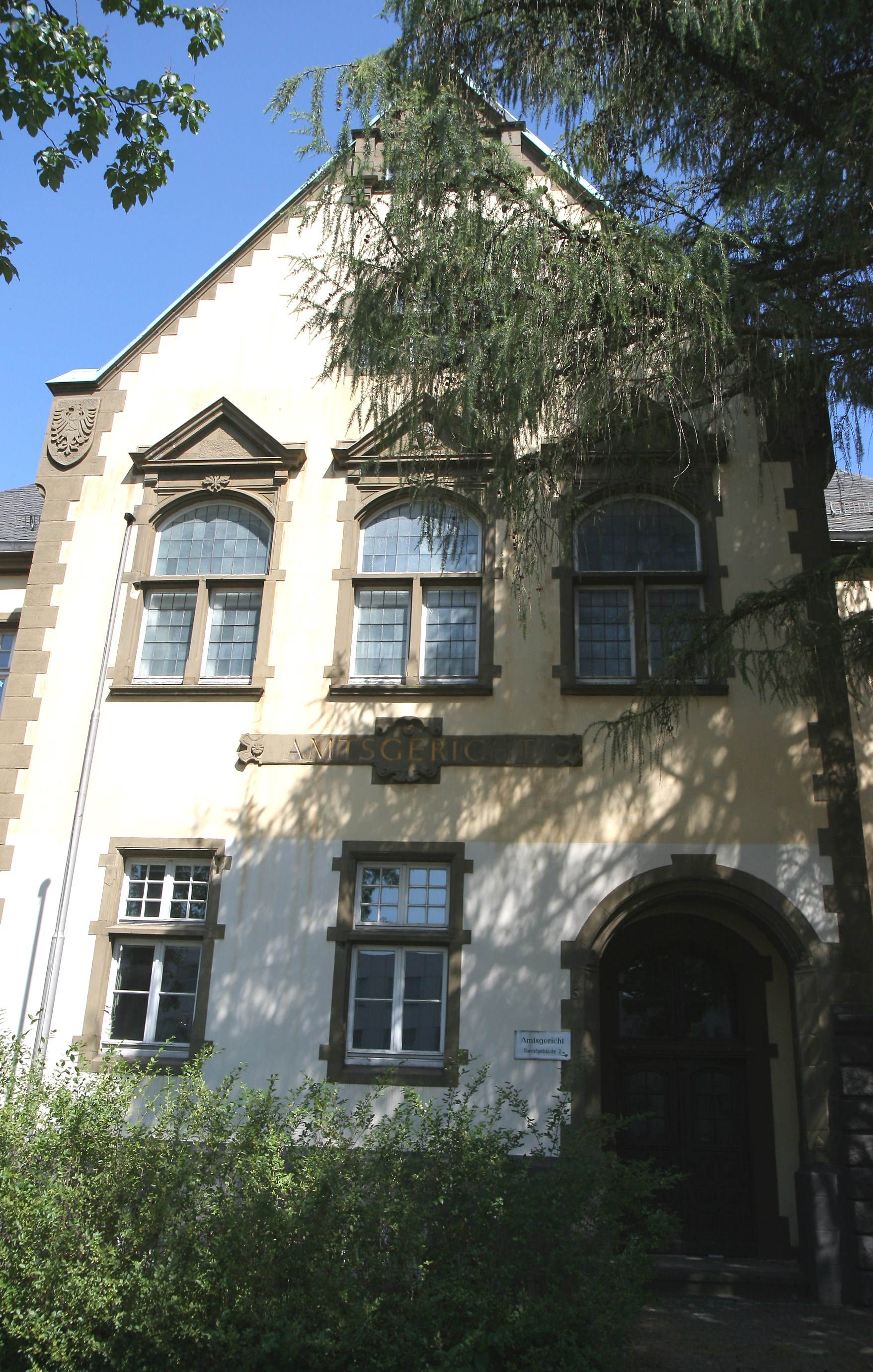 Amtsgericht Mettmann in Mettmann; Altbau Gartenstraße 5, Dienstgebäude 2. This is the photograph of an architectural monument. It is part of the list of cultural monuments of Mettmann, no. 38